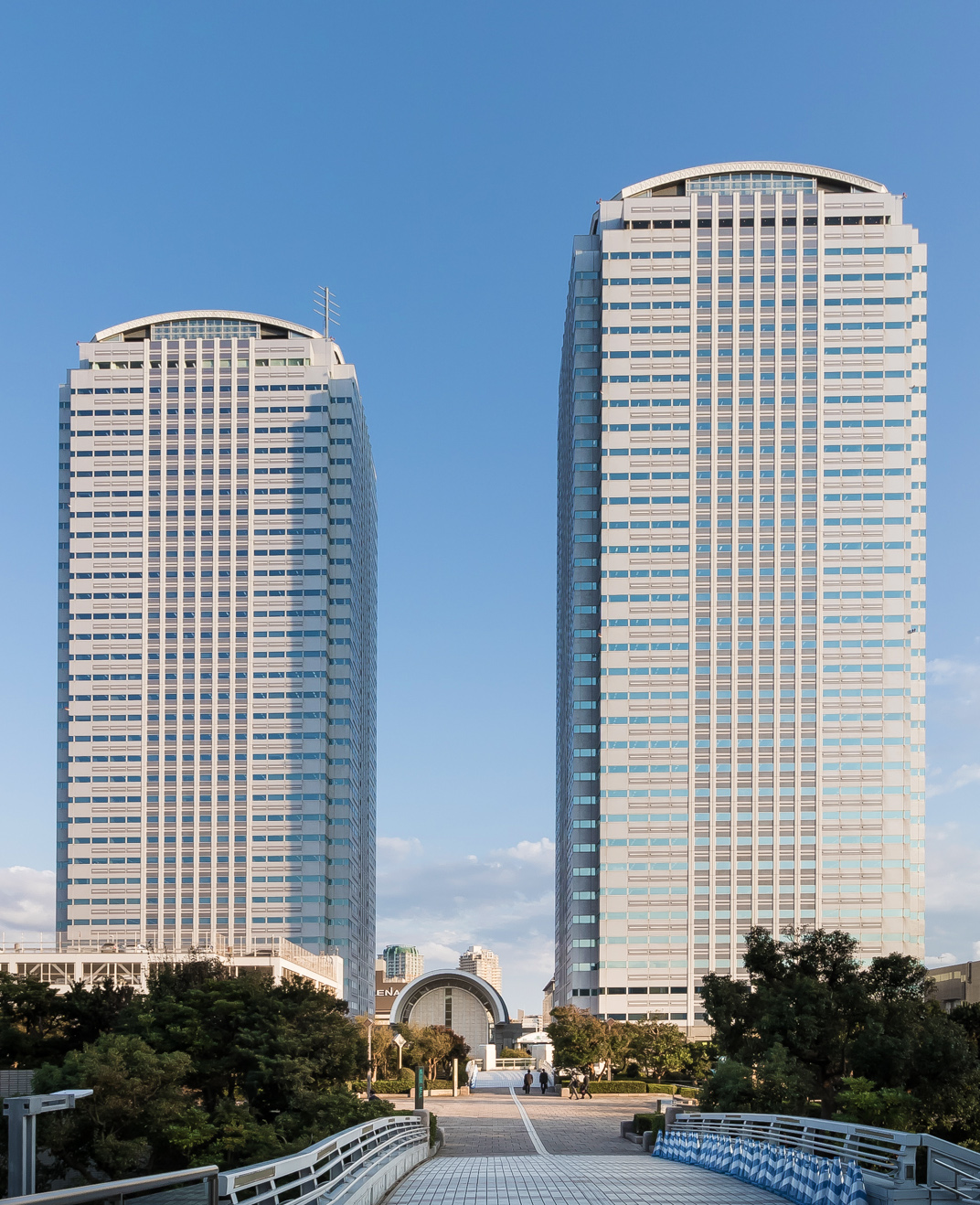 ワールドビジネスガーデン（千葉県幕張）